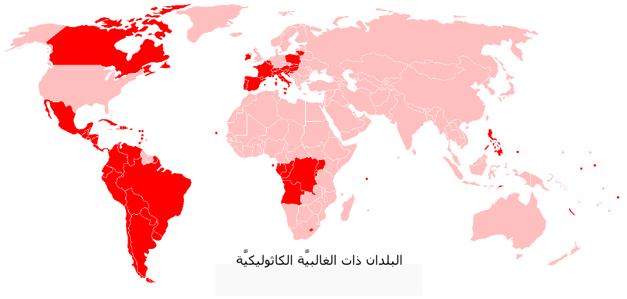 خارطة تُظهر البلدان ذات الغالبيَّة الكاثوليكيَّة من السكَّان